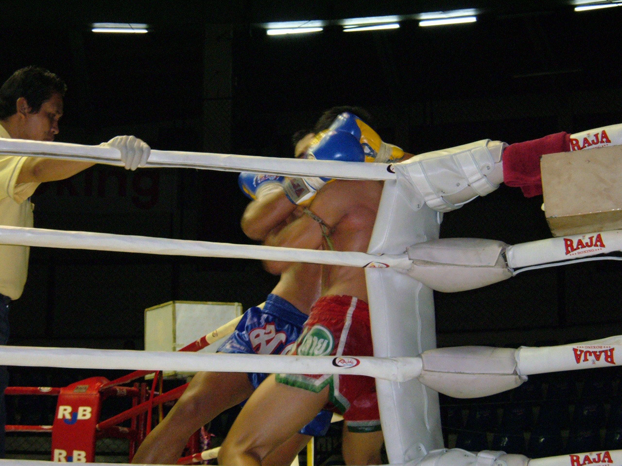 A Muay Thai match at Rajadamnern Stadium in Bangkok, Thailand.